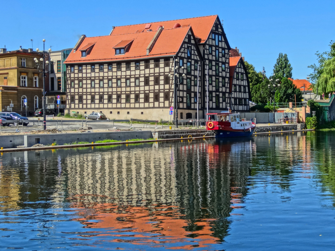 Spichrze nad Brdą w Bydgoszczy, zbud. w latach 1793-1800, od 1964 r. w gestii Muzeum Okręgowego